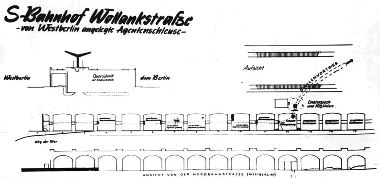 Title: Berlin, S-Bahnhof Wollankstraße, Fluchttunnel Extra information: dem. Berlin = Demokratischer Sektor von Berlin = Ost-Berlin (Berlin/DDR) Factual corrections and alternative descriptions are encouraged separately from the original description. Additionally errors can be reported at this page to inform the Bundesarchiv. Original historic description: Zentralbild. Gefährliche Provokation an der Staatsgrenze der DDR-Durch Agentenschleuse Eisenbahnverkehr aufs äusserste gefährdet. Ein neues eklatantes Beispiel für die friedensgefährdende Rolle der Westberliner Frontstadt-Politik ist am 1.2.1962 auf einer internationalen Pressekonferenz in Berlin enthüllt worden. Vor in- und ausländischen Journalisten, darunter Vertretern westdeutscher Zeitungen, informierte der Minister für Verkehrswesen der DDR, Erwin Kramer, auf dem Gelände des S-Bahnhofes Wollankstrasse über die ungeheuerliche Tatsache, dass Westberliner Banditen unter gröbster Verletzung der Staatsgrenze der DDR durch die Gewölbe dieses Bahnhofes ein Stollensystem vorgetrieben haben. Durch die Anlage dieses Stollensystems sollten Agenten und Diversanten von Westberlin in das Gebiet der DDR eingeschleust werden. UBz: Schematische Übersicht vom S-Bahnhof Wollankstrasse mit den 15 S-Bahnbogen.